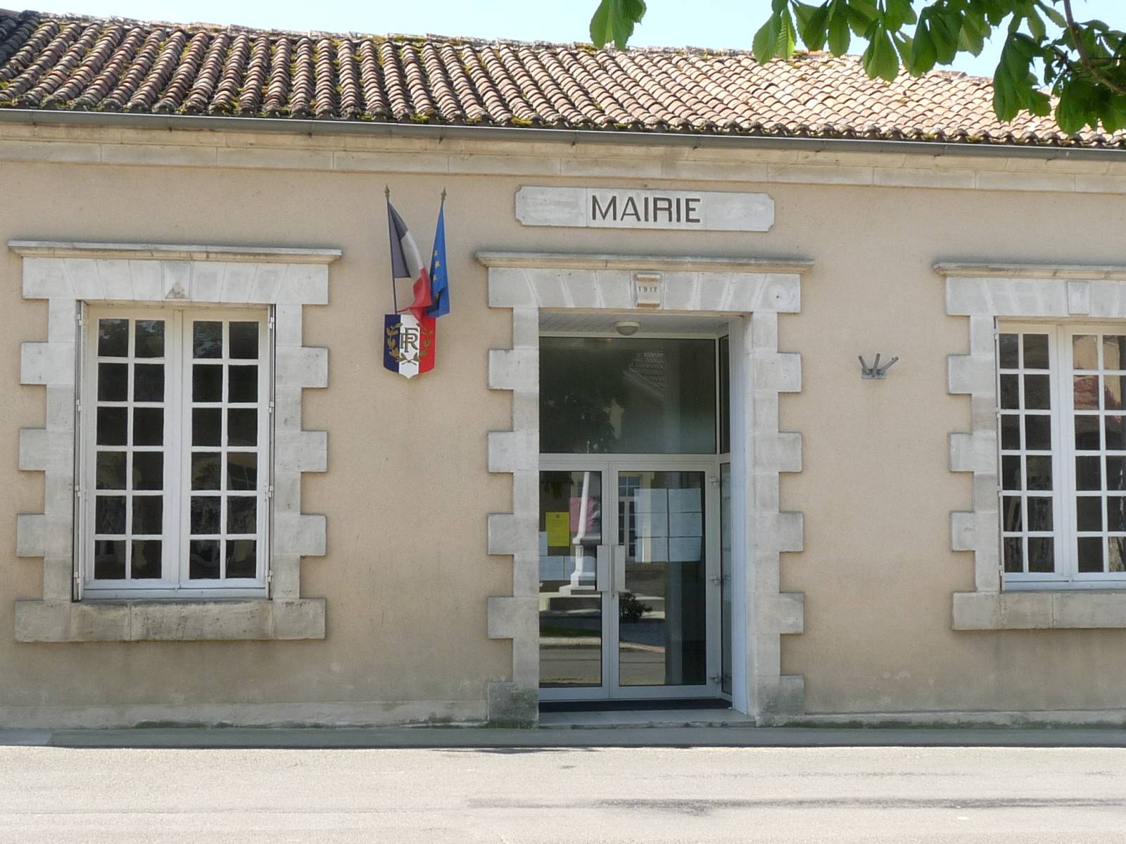 Mairie d'Abzac, Charente, France